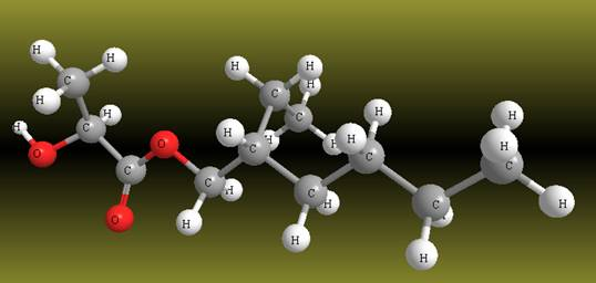 Molécula de lactato de 2-etilhexilo.